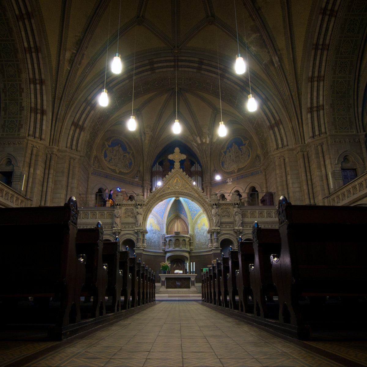 Innenansicht der Ringkirche Wiesbaden, beleuchtet, kurz vor einem Orgelkonzert.